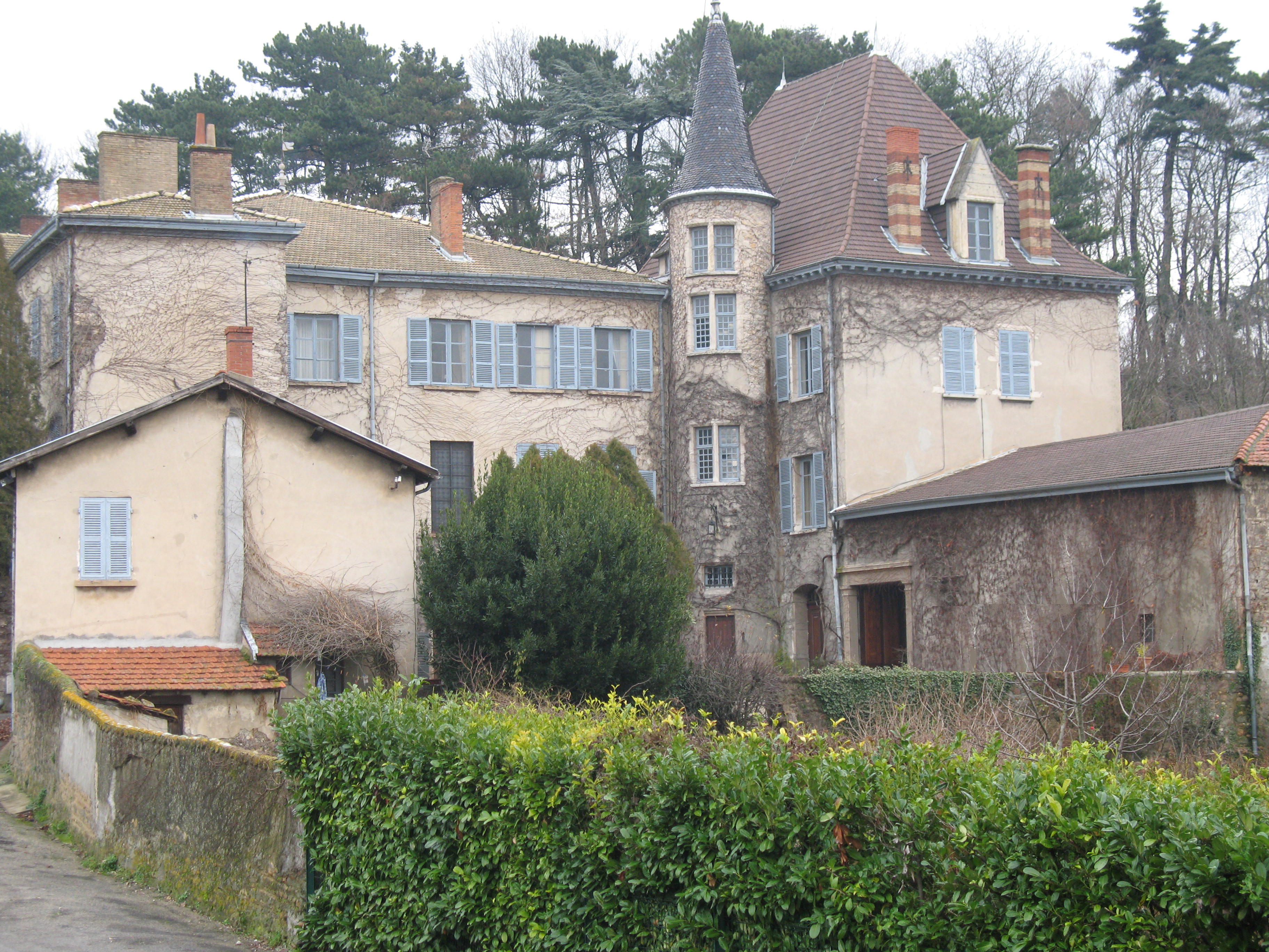 Château de la Combe à Irigny dans le Rhône